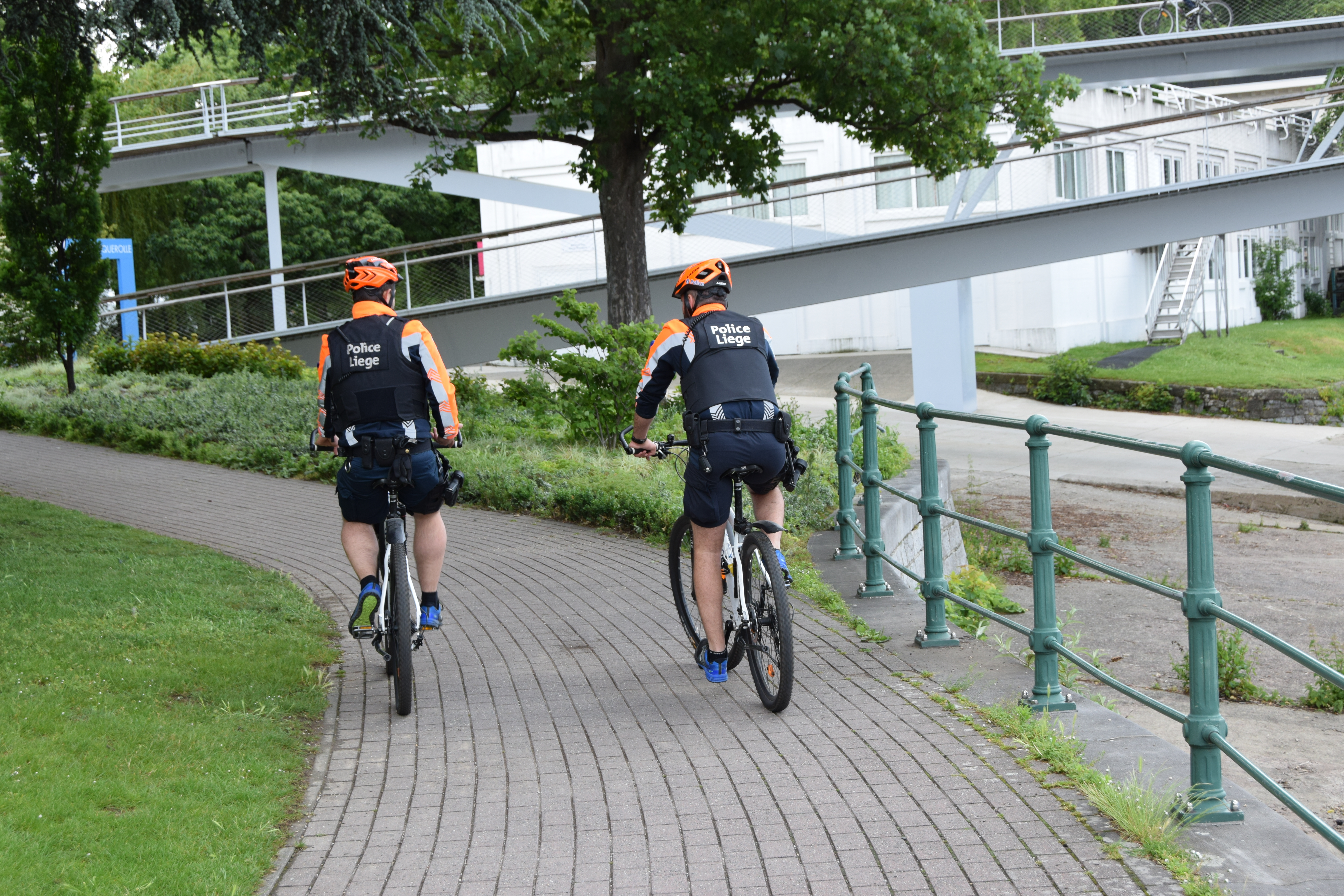 Vue du parc de la Boverie à Liège : patrouille de policiers à bicyclette.